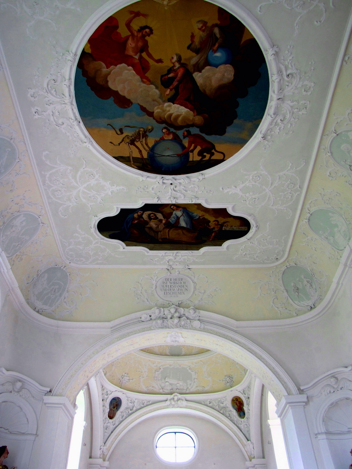 Stuckierung in der Auferstehungskirche in Breitenwang (Tirol) von Thomas Seitz